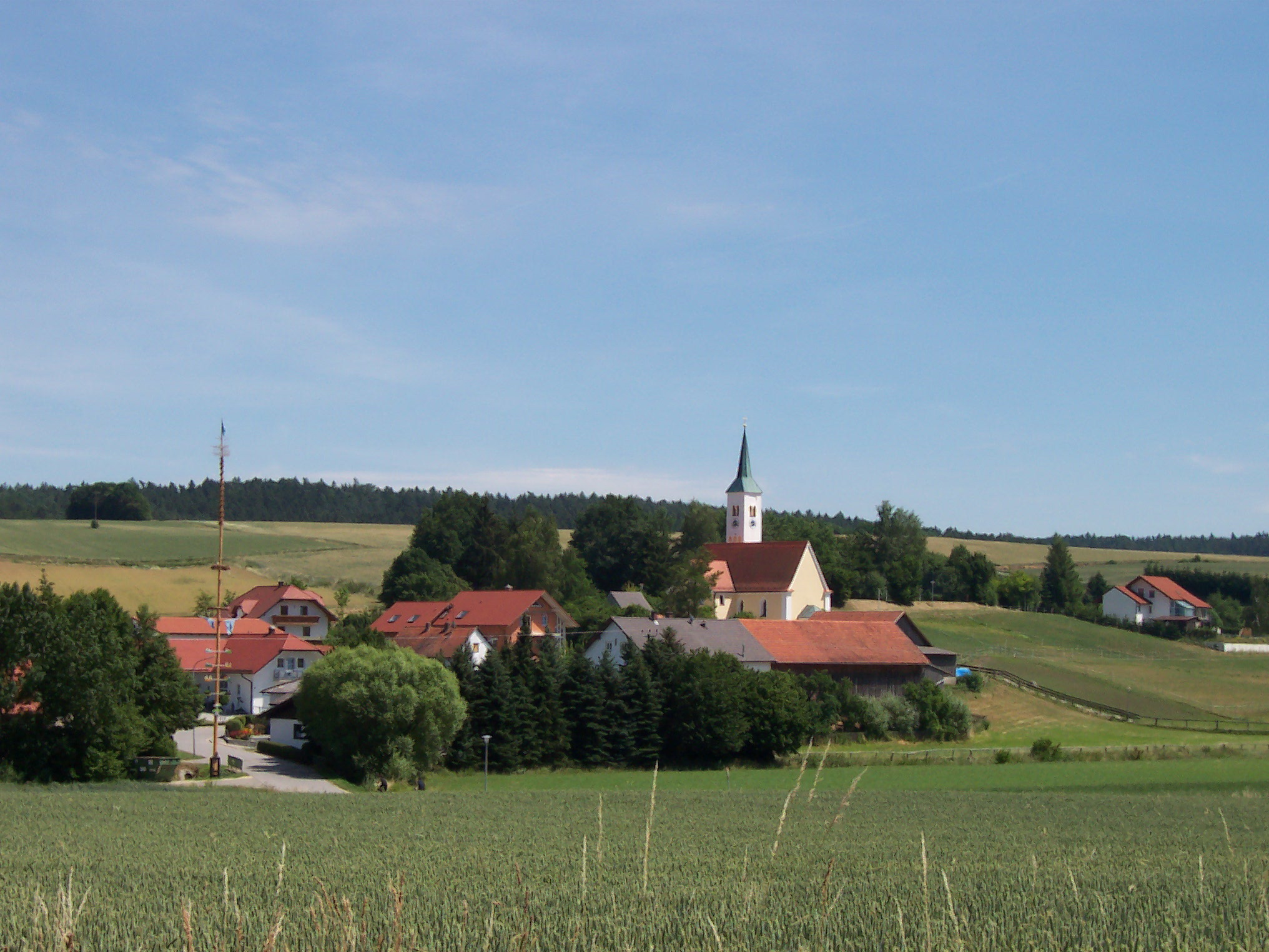 Bayerbach bei Ergoldsbach, Greilsberg, Kirchbergstraße 15. Filialkirche St. Nikolaus und Kapelle.